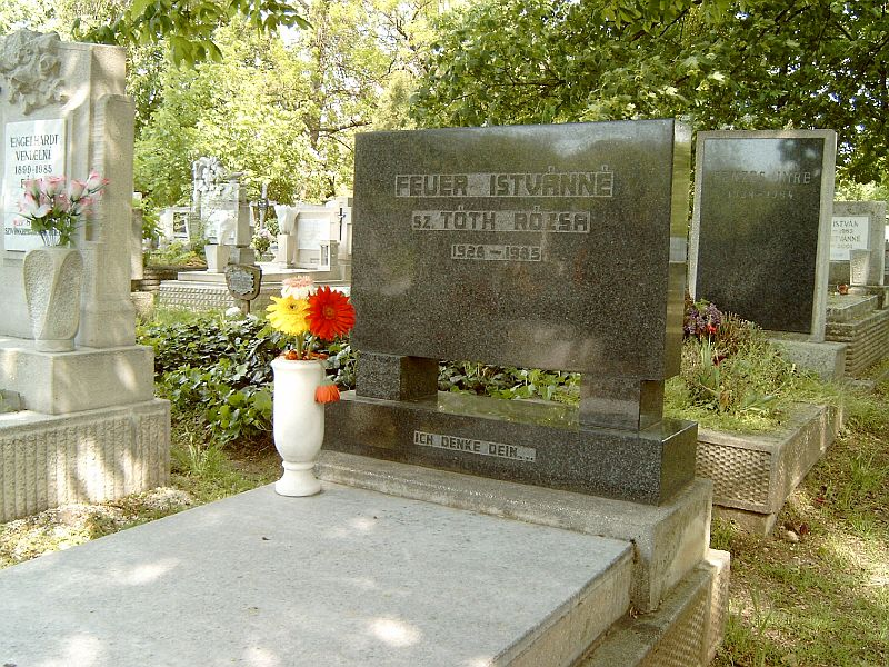 Feuer Istvánné Tóth Rózsa (Zalaegerszeg, 1928. február 3. - Budapest, 1985. április 27.), művészettörténész sírja Budapesten. Új köztemető: 32/1-26-1.